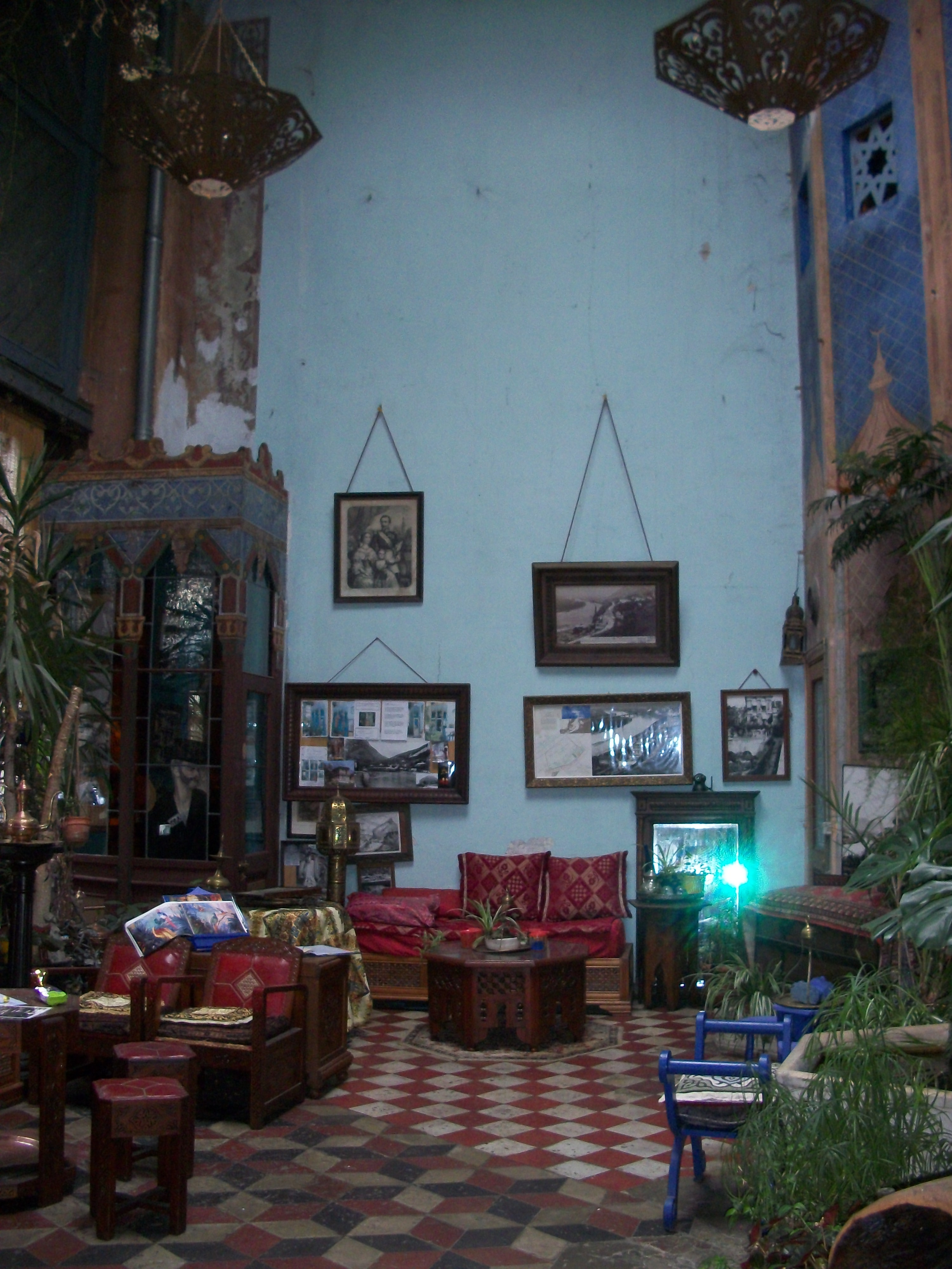 Journées contributives à la Casamaures, Saint-Martin-le-Vinoux, France